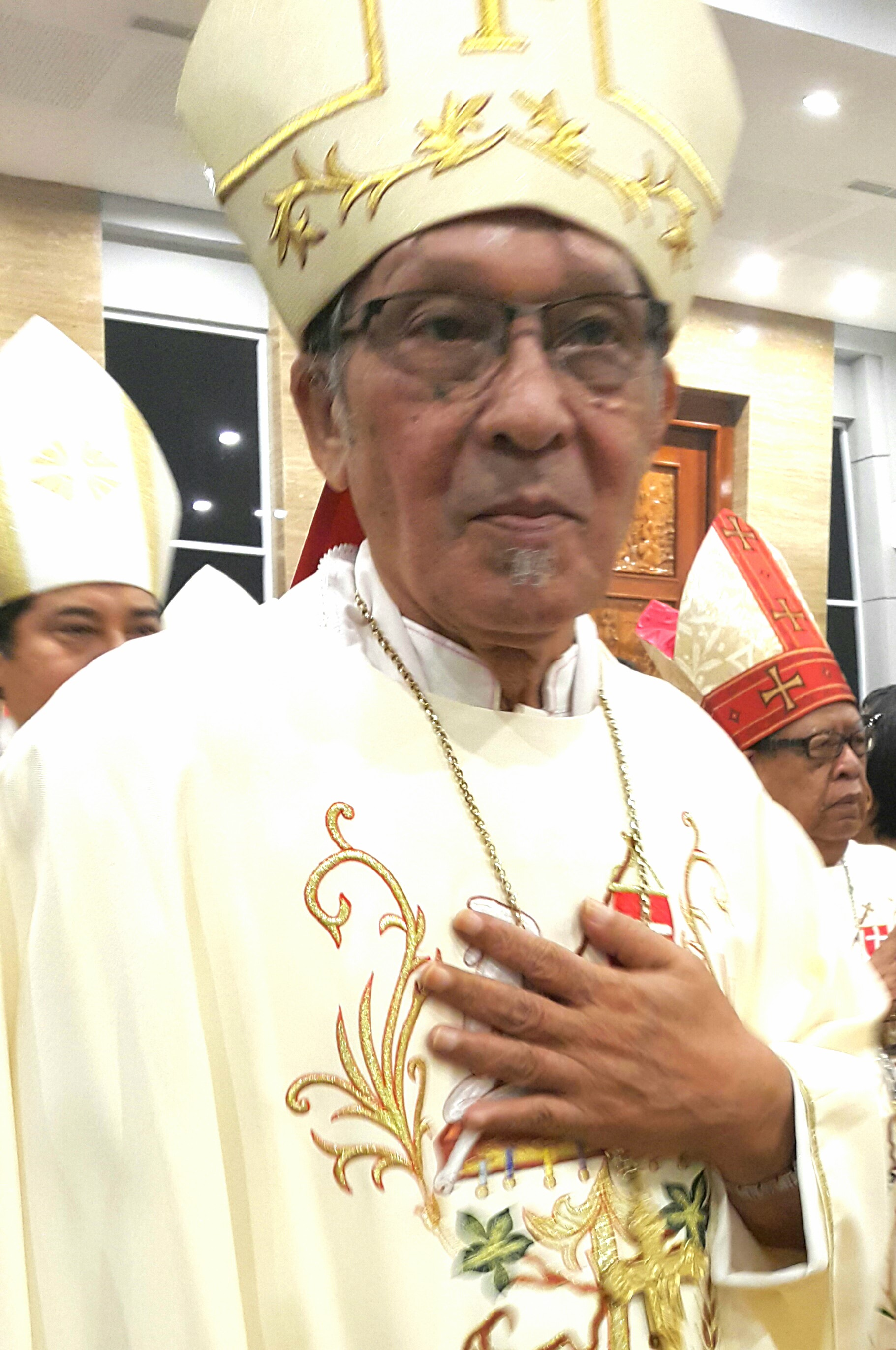 Mgr Petrus Turang, Uskup Agung Ende